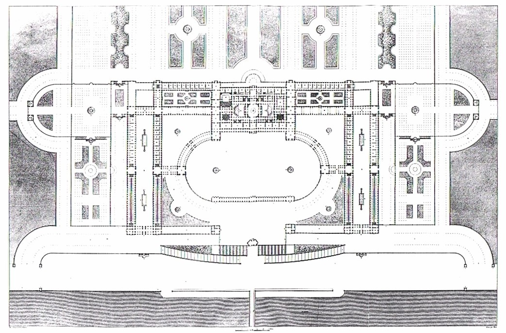 Plan du palais conçu par Pierre Fontaine et Charles Percier pour le Roi de Rome.